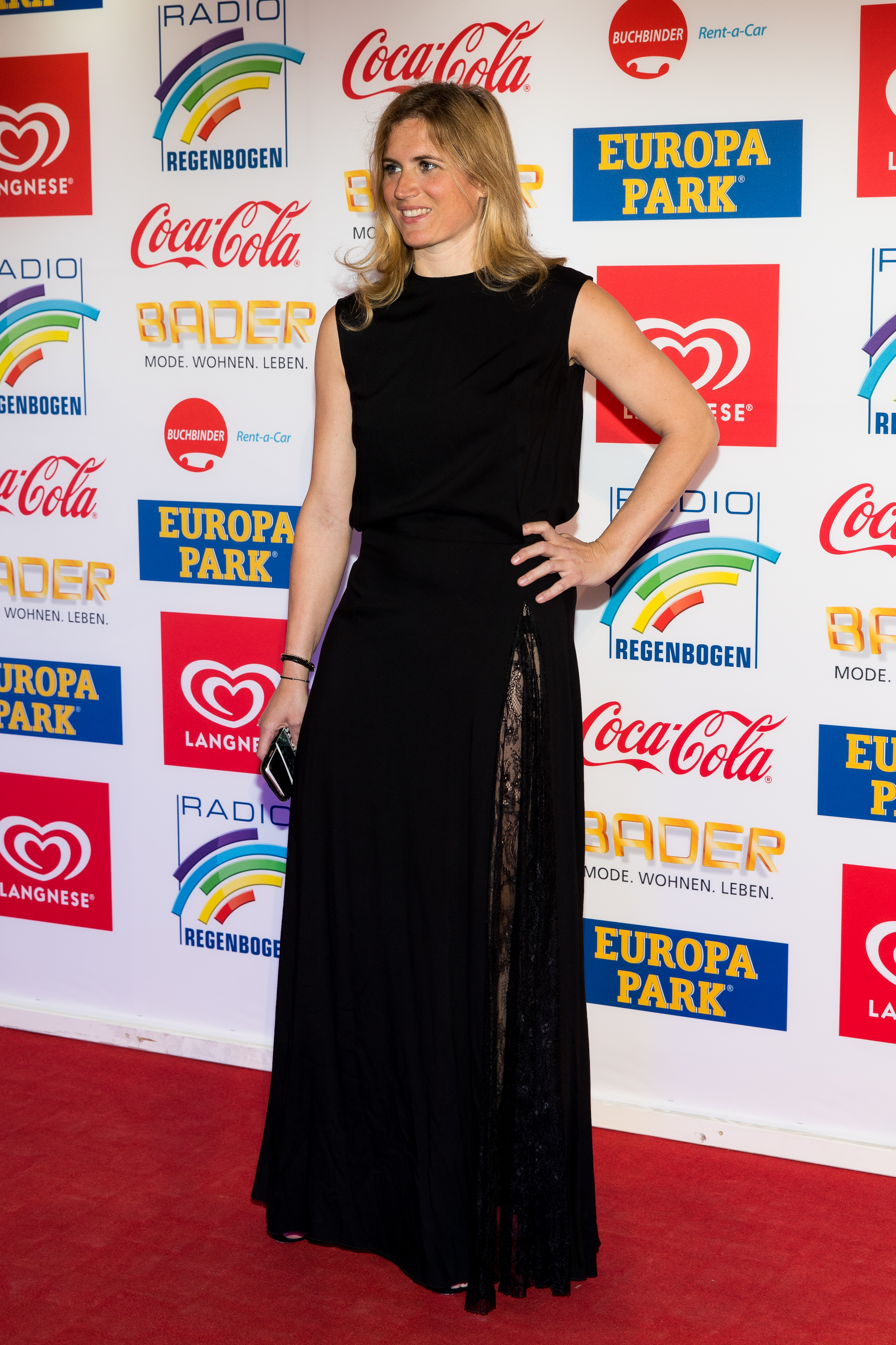 during Radio Regenbogen Award 2017 at Europapark, Rust, Baden-Württemberg, Germany on 2017-04-07, Photo: Sven Mandel